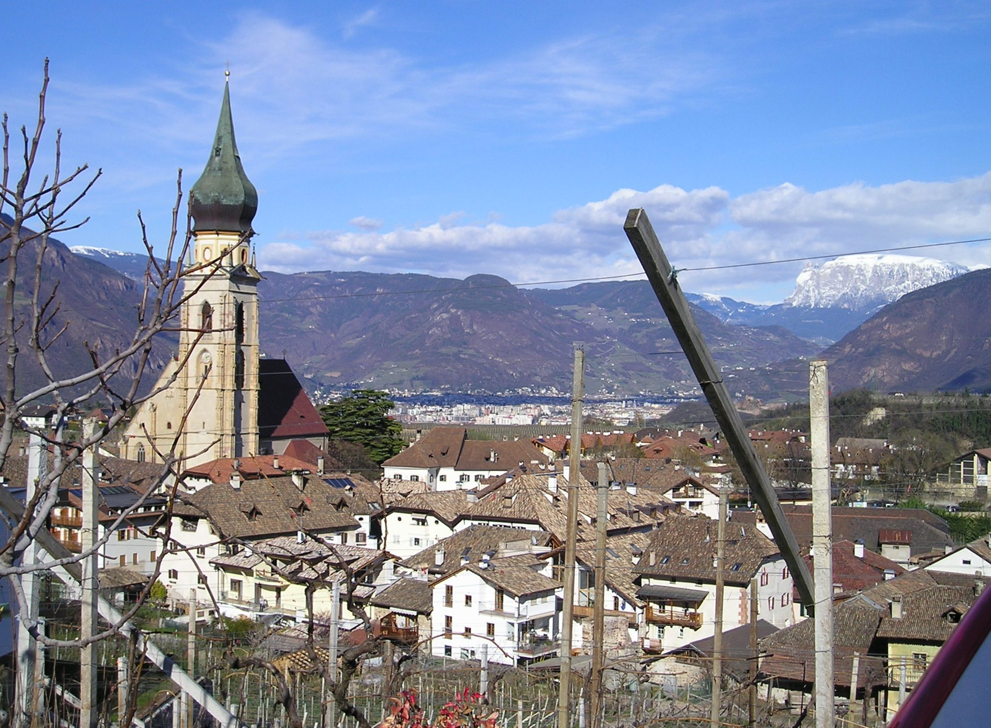 Eppan St. Pauls mit Bozen und dem Schlern im Hintergrund